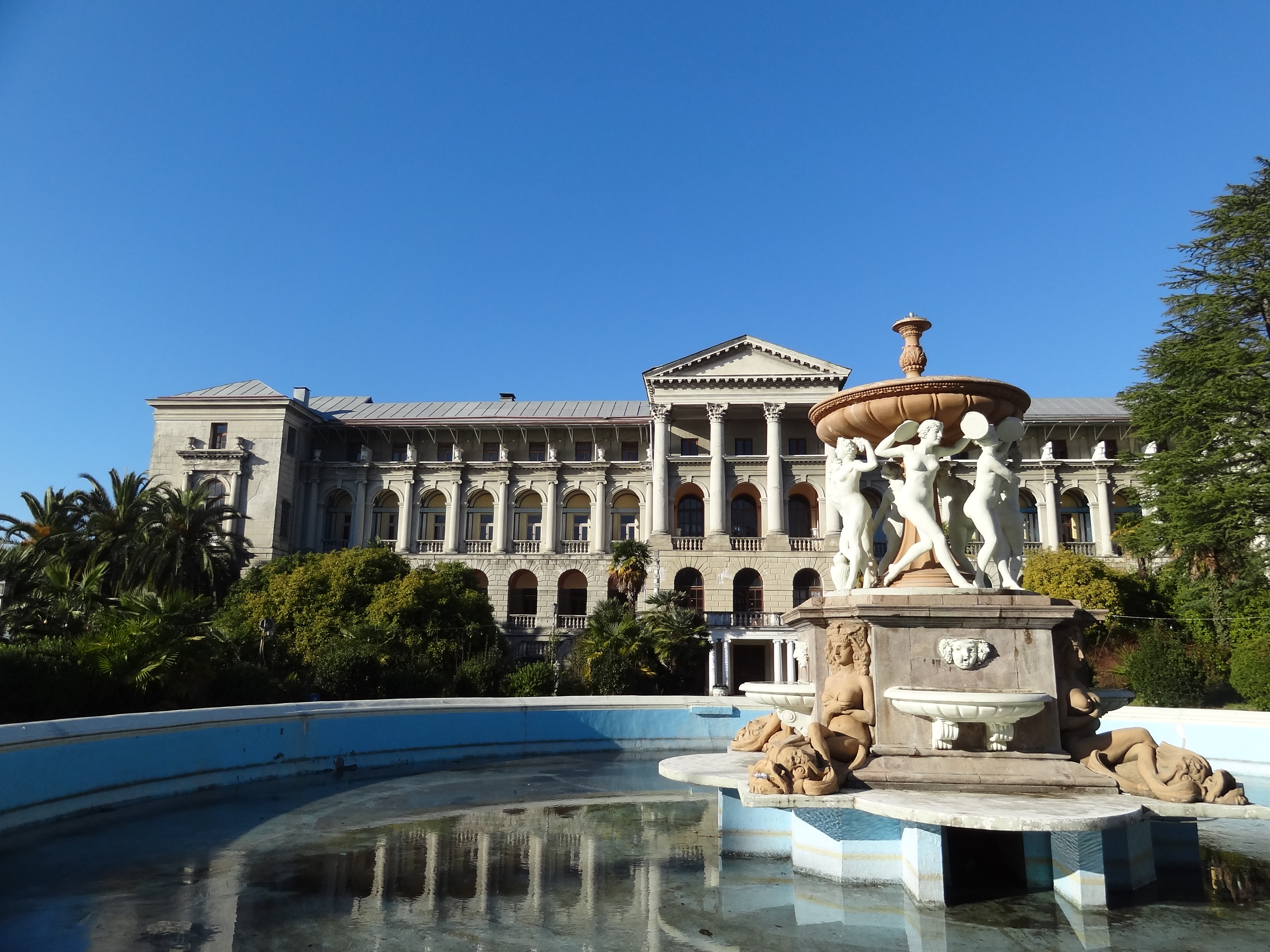 Здания санатория им. с. орджоникидзе. здесь в годы Великой Отечественной войны размещался госпиталь № 2132 (Краснодарский край, Сочи, курортный пр., 96, санаторий им. орджоникидзе)